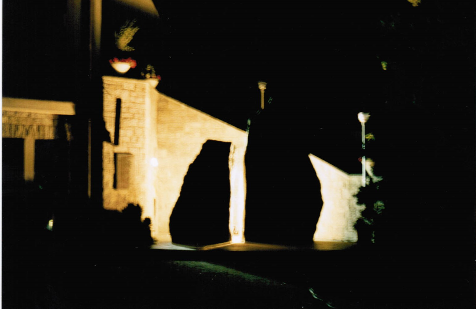 Bergführerdenkmal und Beleuchtung, Schweizer Kanton Wallis